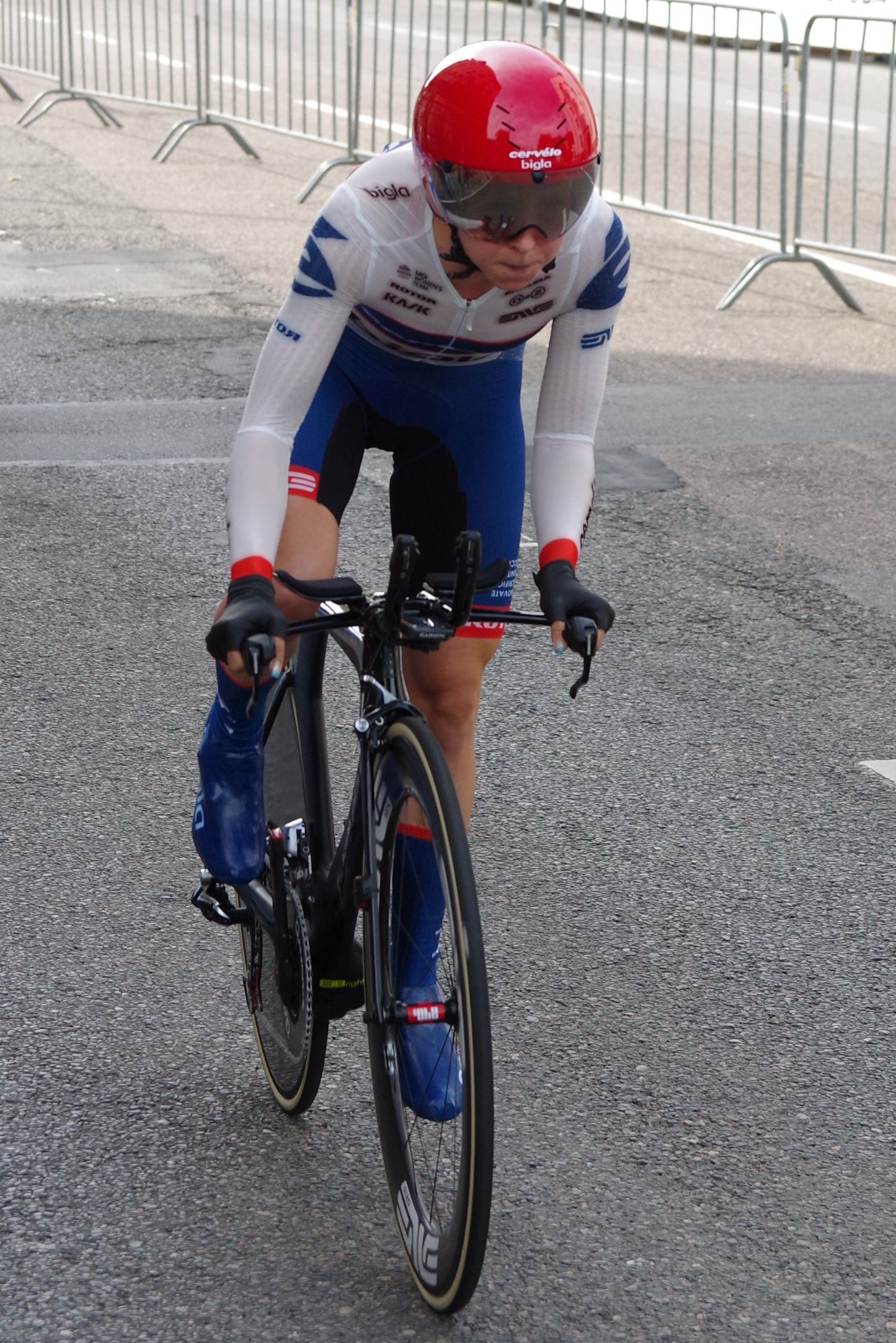 Deutsche Meisterschaften im Einzelzeitfahren 2017 23. Juni 2017 The making of this document was supported by the Community-Budget of Wikimedia Germany.